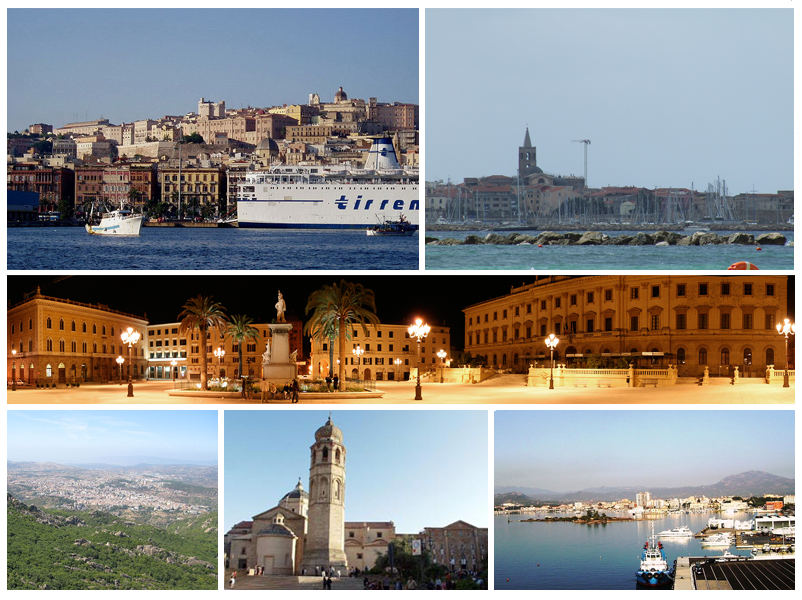 Le città sarde a capo delle aree urbane e cluster più popolosi dell'isola. Prima fila (in alto) : Cagliari , Alghero ; seconda fila :Sassari ; terza fila :Nuoro , Oristano , Olbia